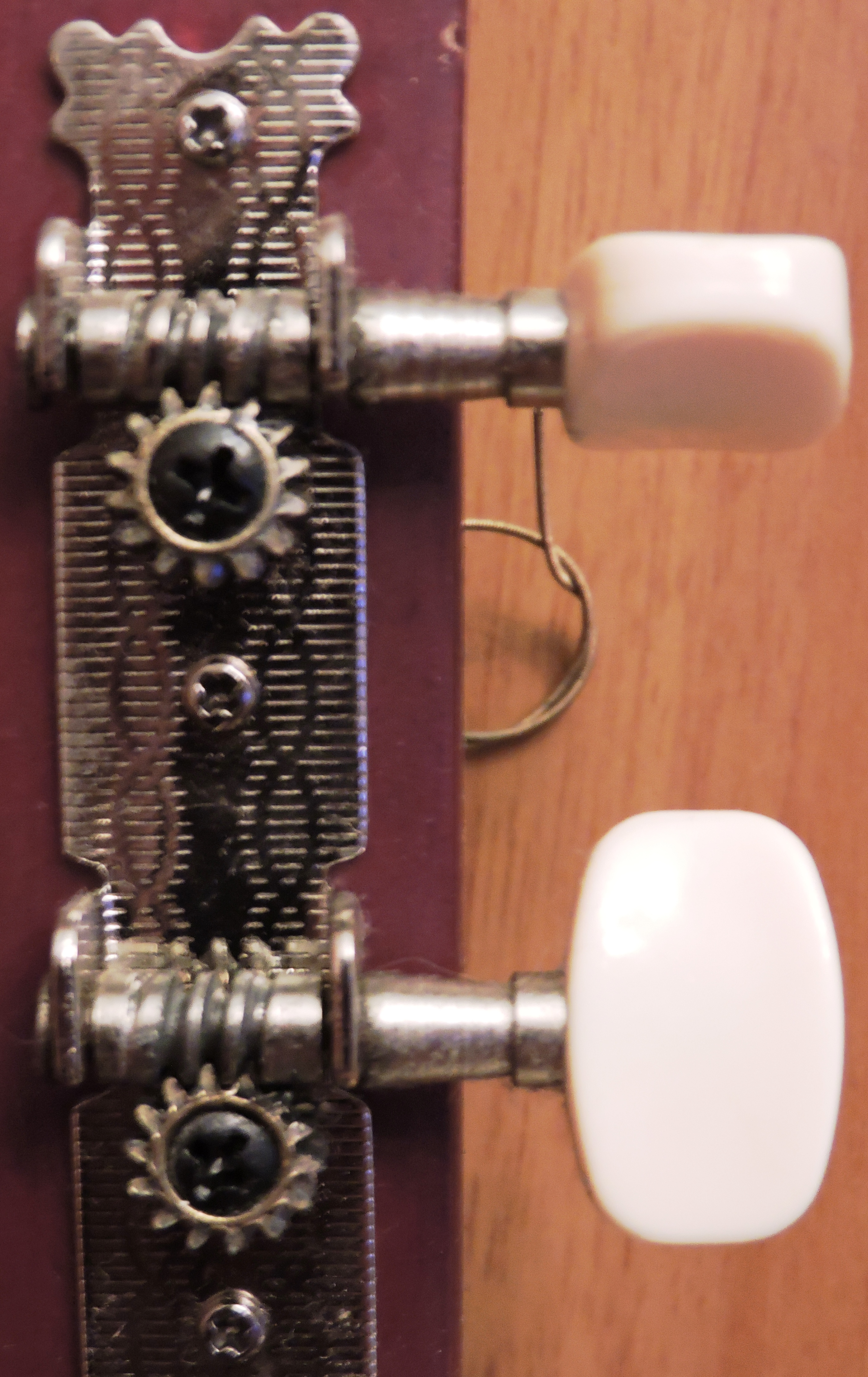 Колок гитары